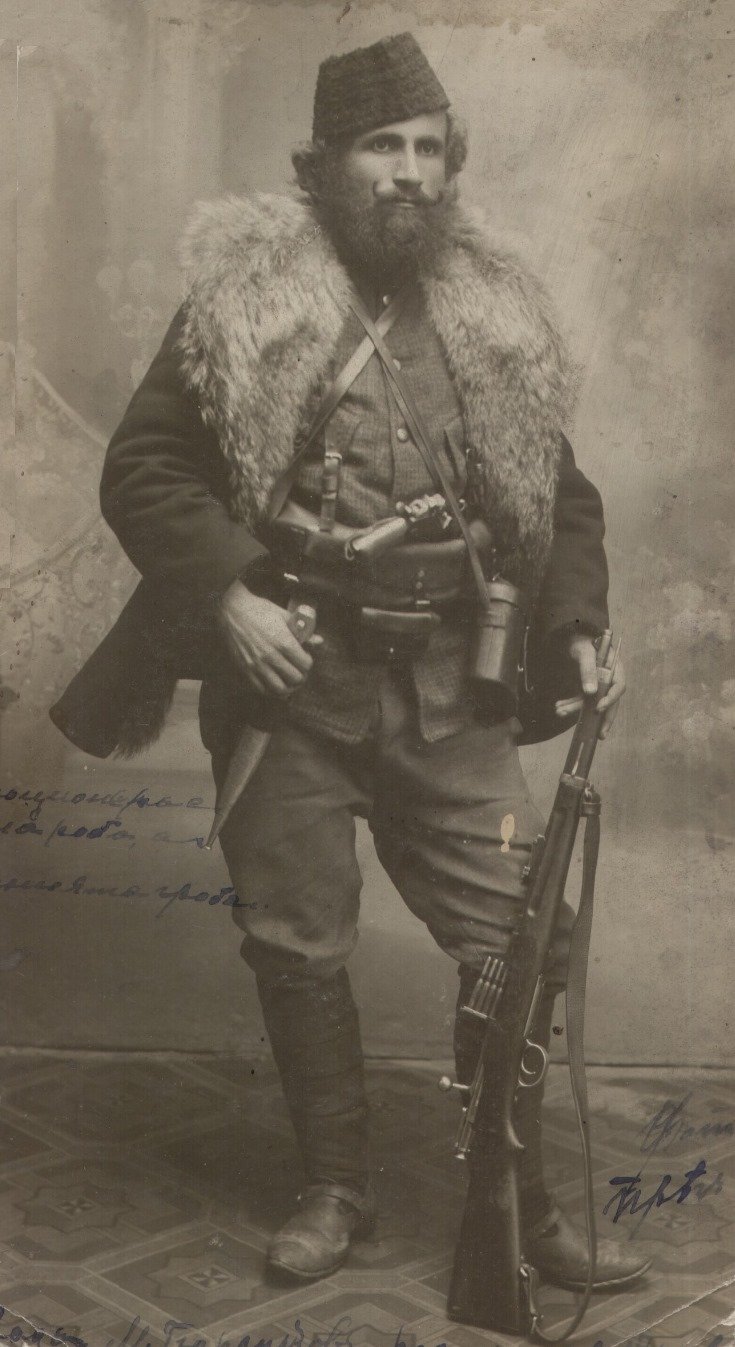 Милан Гюрлуков.